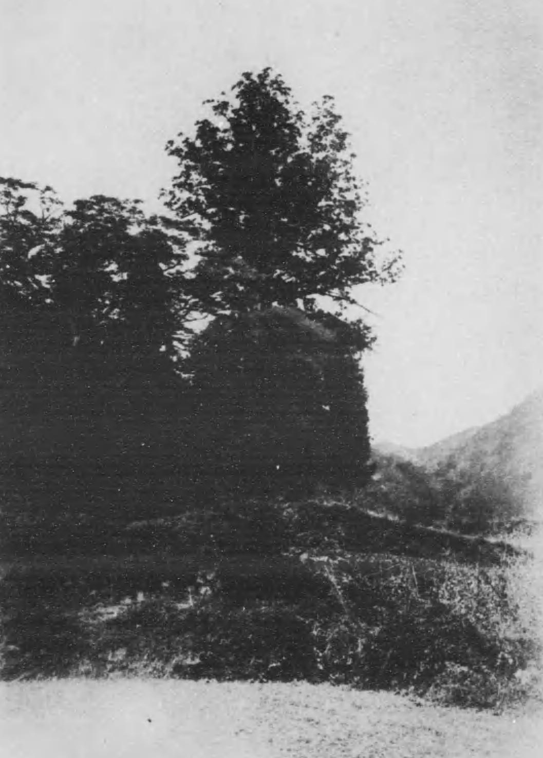 手野の大杉の戦前の写真。